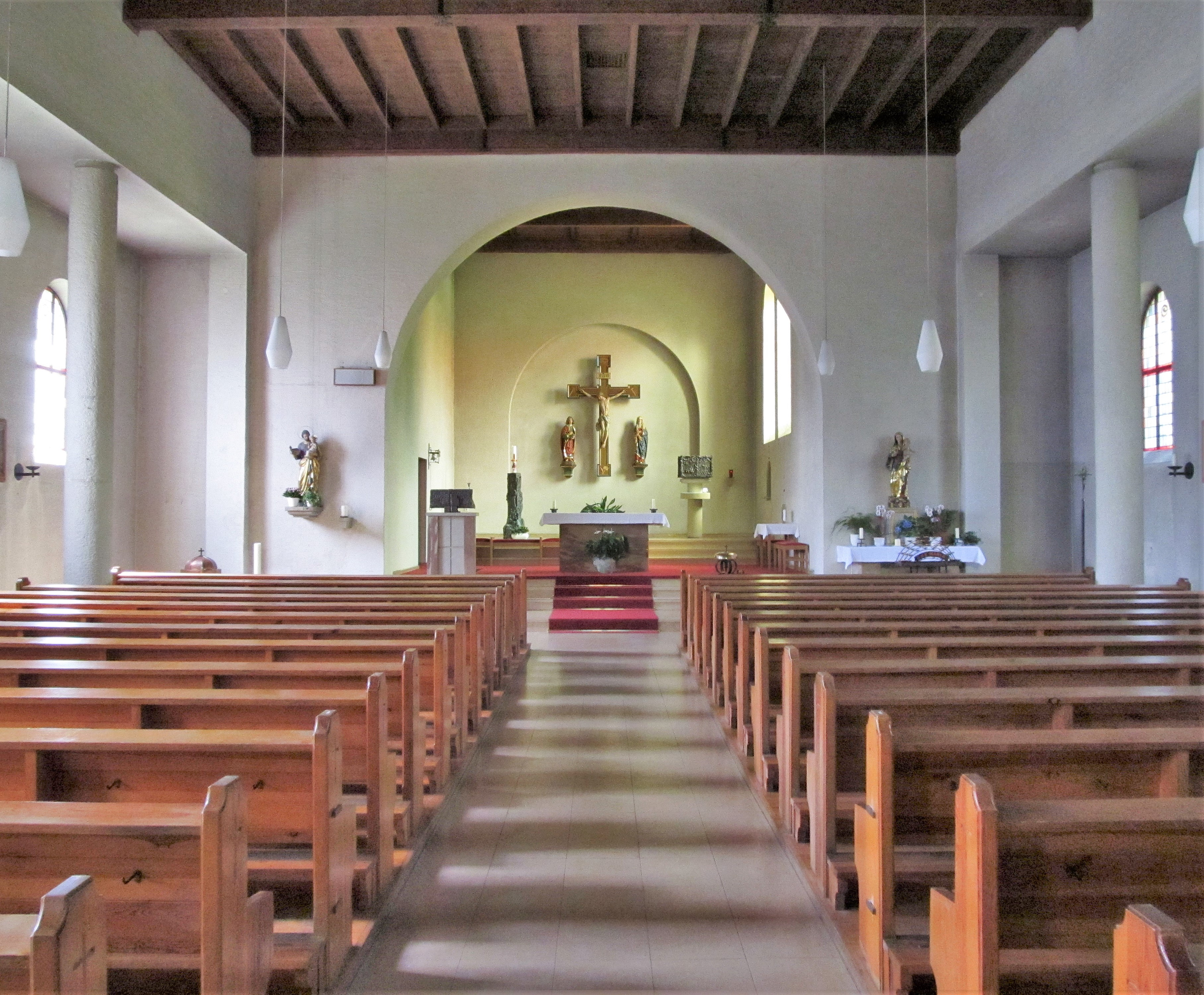 Blick ins Innere der katholischen Kirche St. Josef in Heckendalheim, Gemeinde Mandelbachtal, Saarland